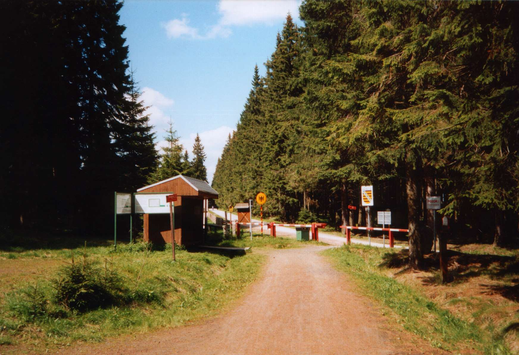 Grenzübergang Himmelswiese